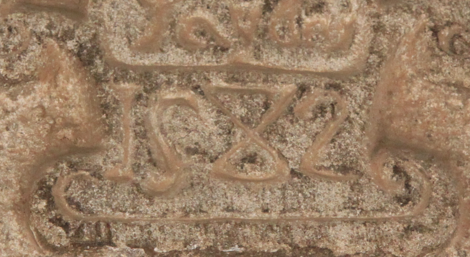 Dintell d'una casa del poble de Santa Pau